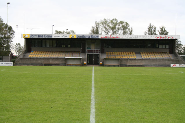 Hoofdveld van VV Sneek. Foto: Richard Sytsma, VV Sneek.